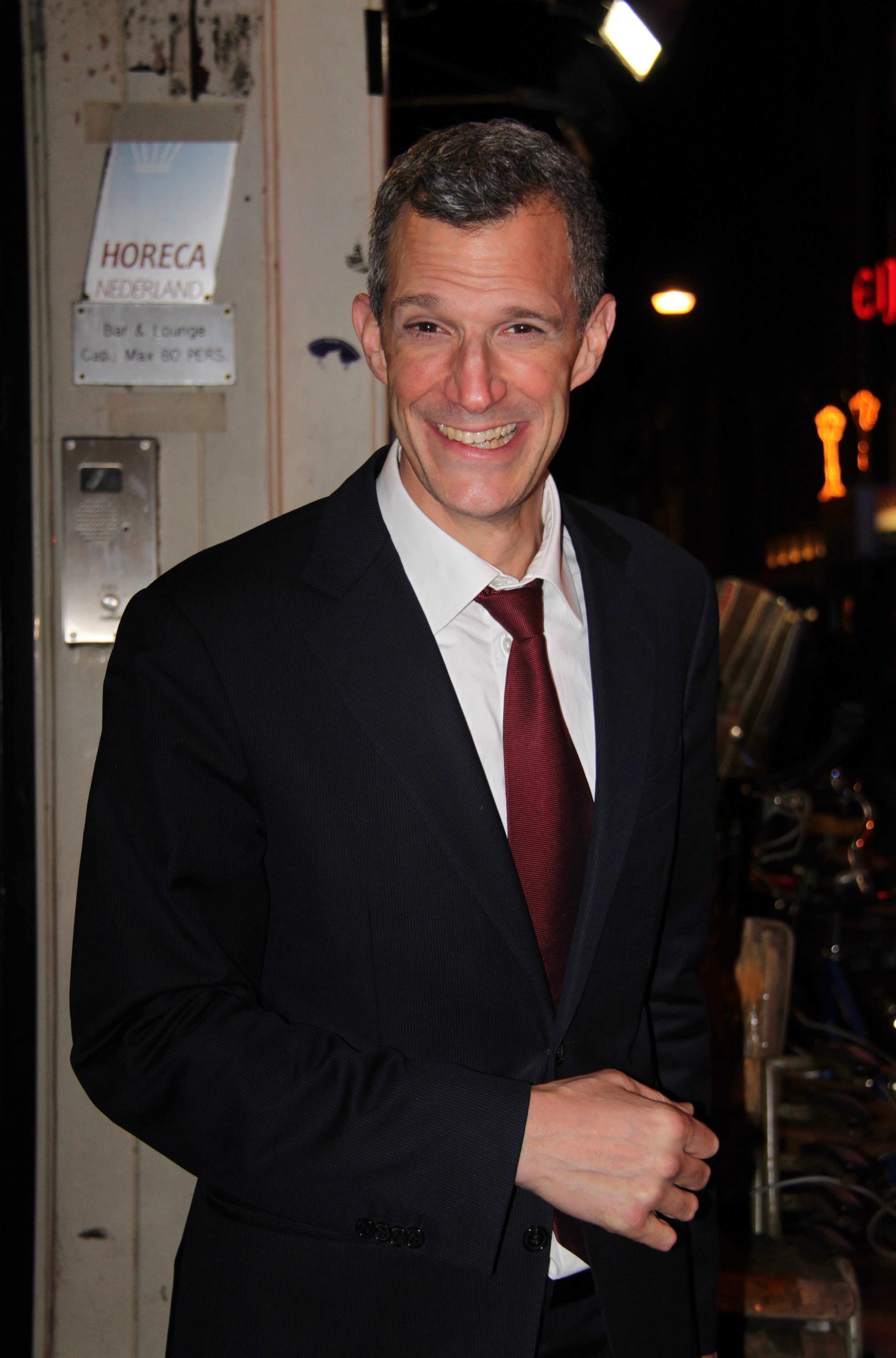 Greg Shapiro na afloop van de show "My big fat American election" in het theater van Boom Chicago aan het Leidseplein in Amsterdam.